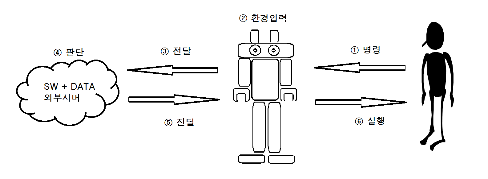 클라우드 로봇의 작동 과정